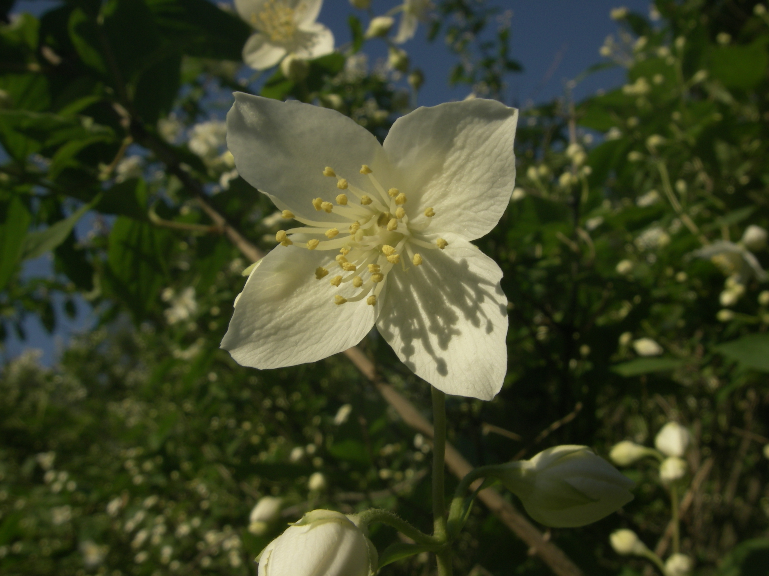 Чубушник венечный (Ptiladelphus coronarius) (куст), Спб, Таврический сад. См также Image:Неизвестный цветок.jpg.